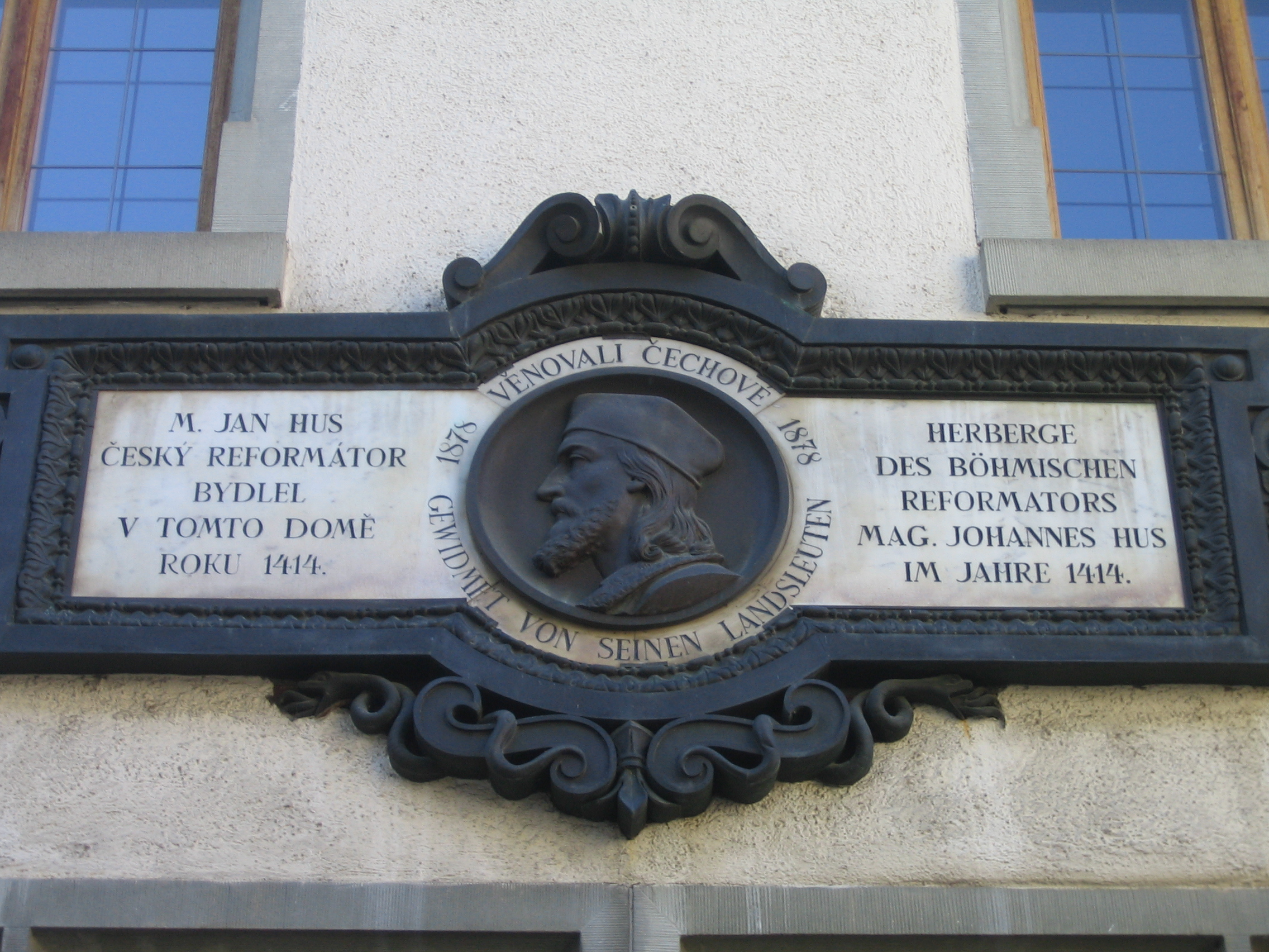 Konstanzer Herberge von Jan Hus im Jahre 1414. - Foto: Stana Vetsch, 27. Februar 2006, 15.12 Uhr.